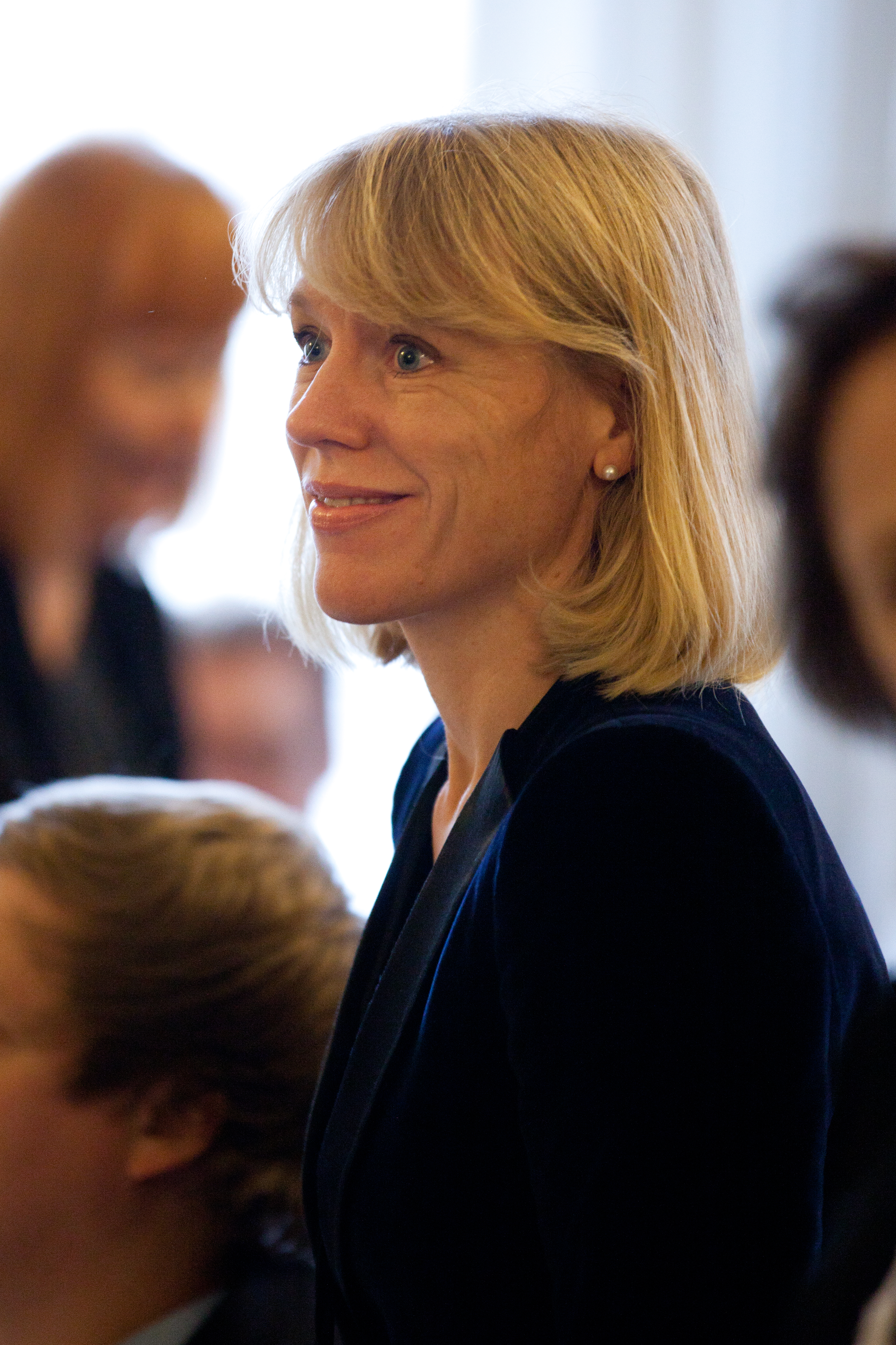 Norges kulturminister Anniken Huitfeldt under ett nordiskt kulturministermöte vid Nordiska Rådets session 2011 i Köpenhamn.